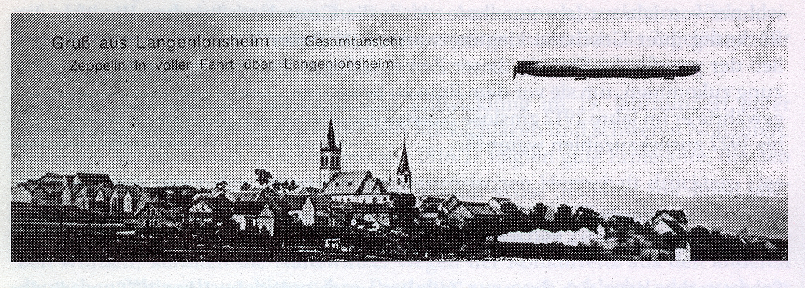 s.o.